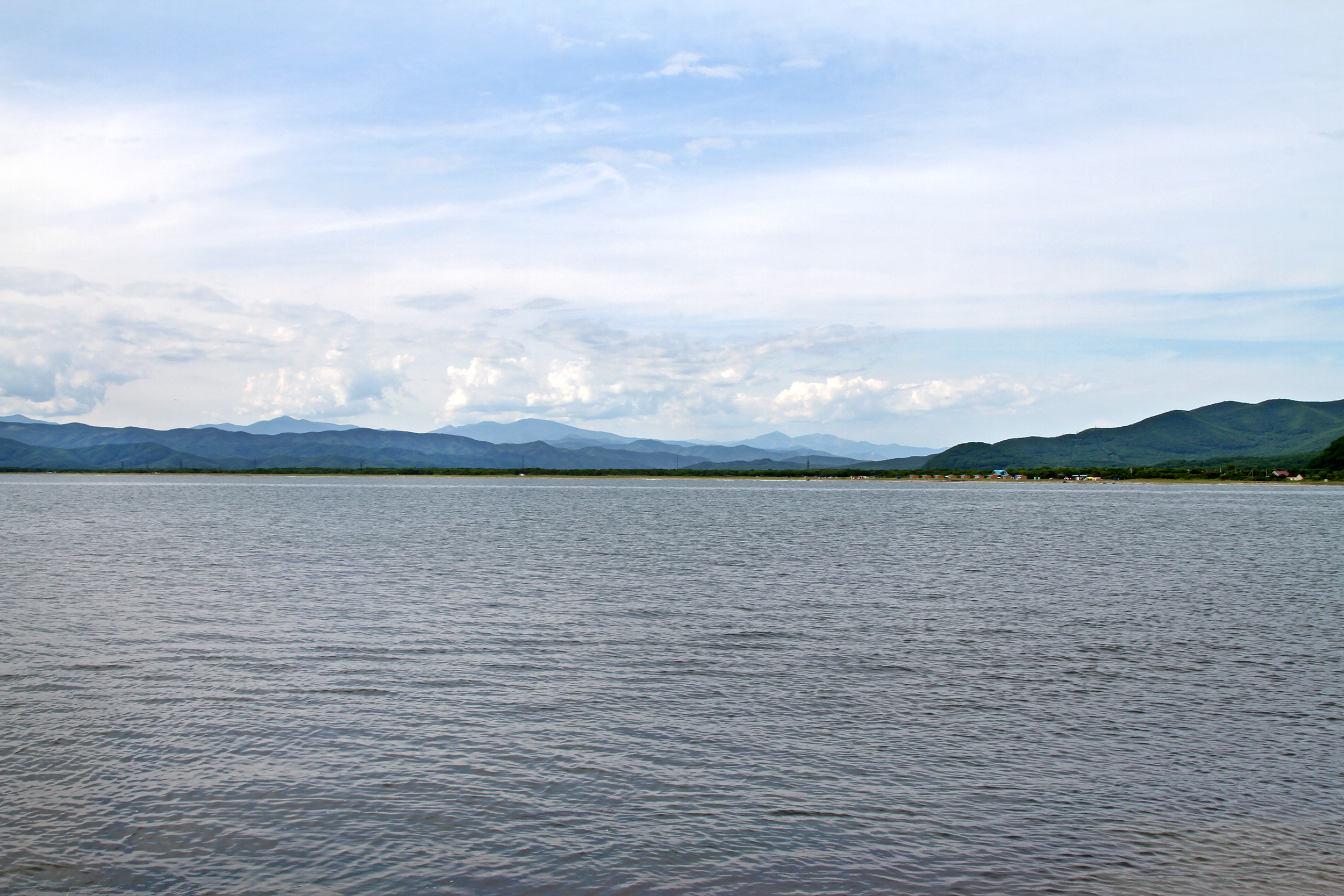 Побережье бухты Киевка, Лазовский район Приморского края, Россия